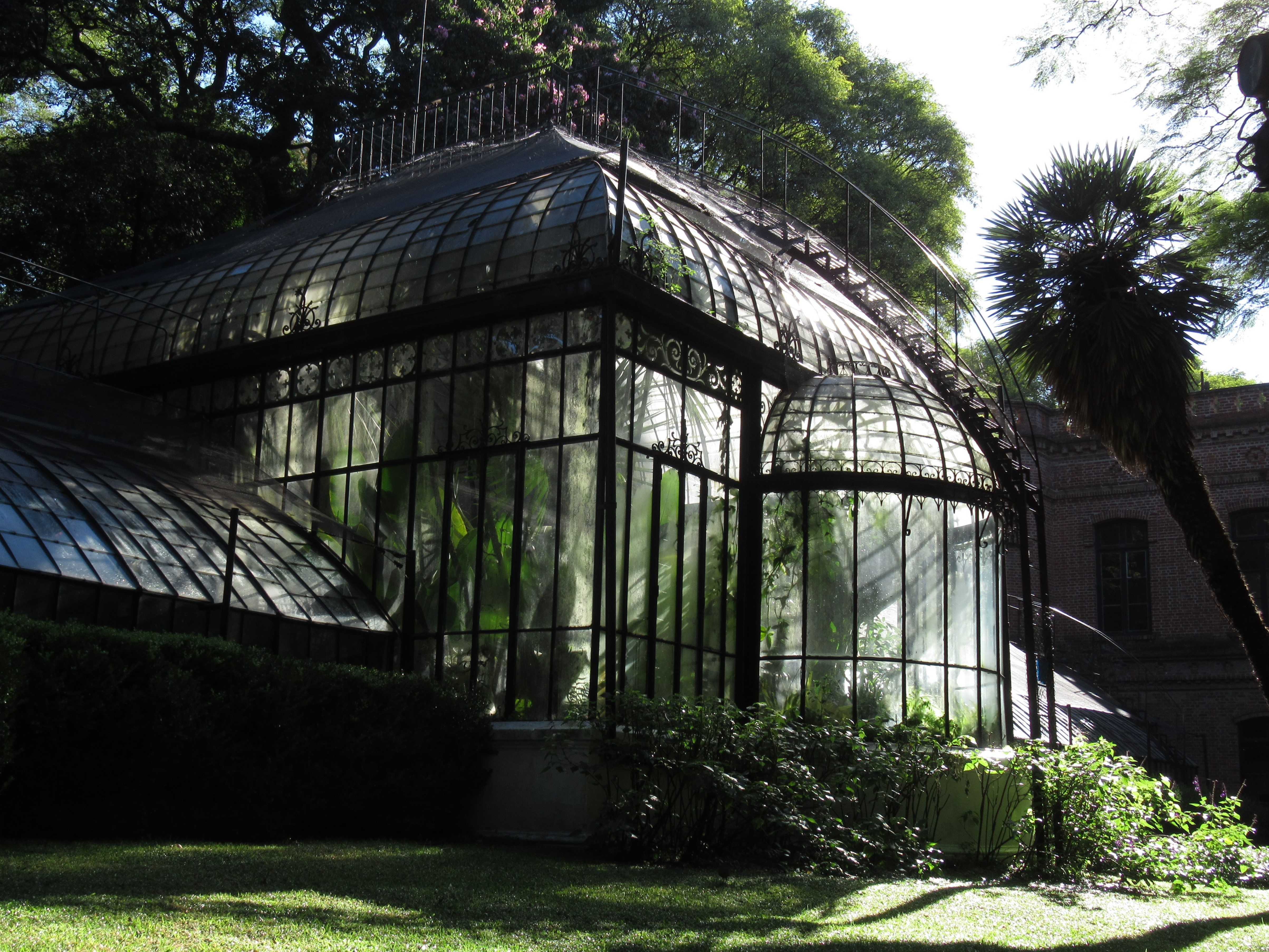 Invernadero del Jardín Botánico Carlos Thays